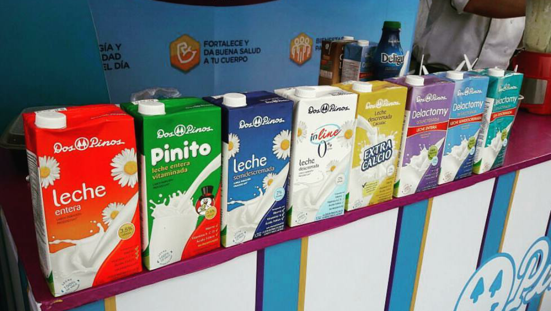 Leche Dos Pinos de Costa Rica